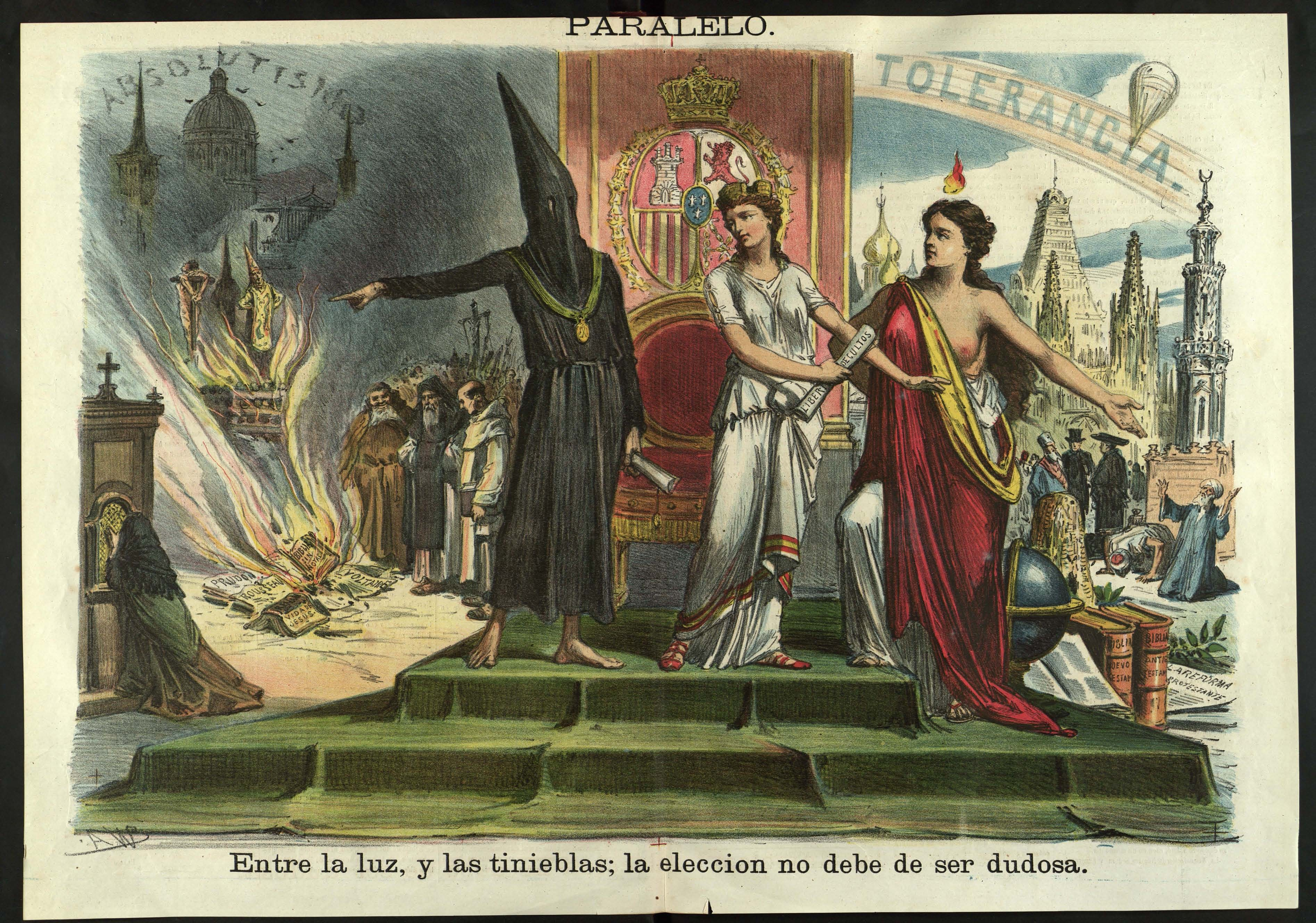 Paralelo o Las dos Españas